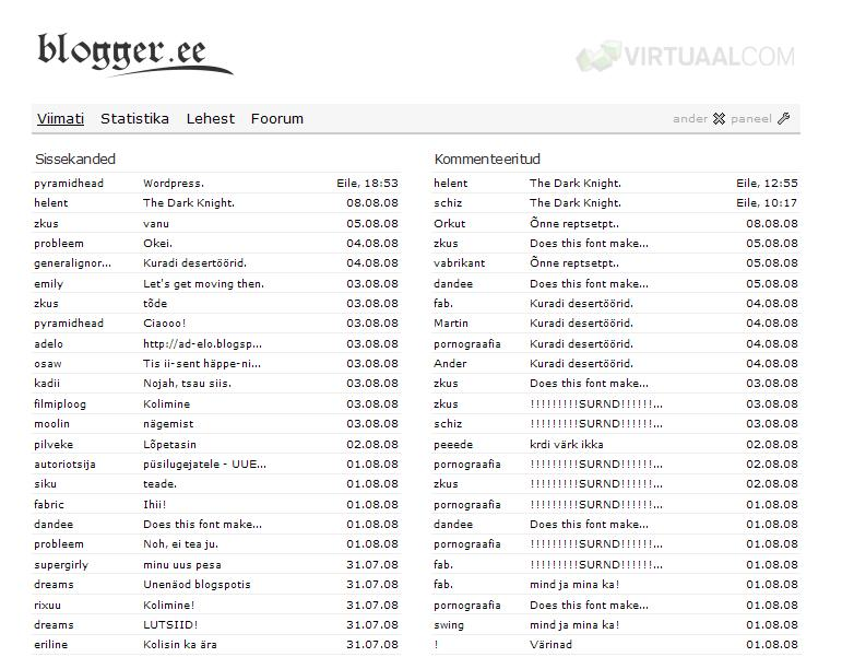 Blogger.ee vana avaleht